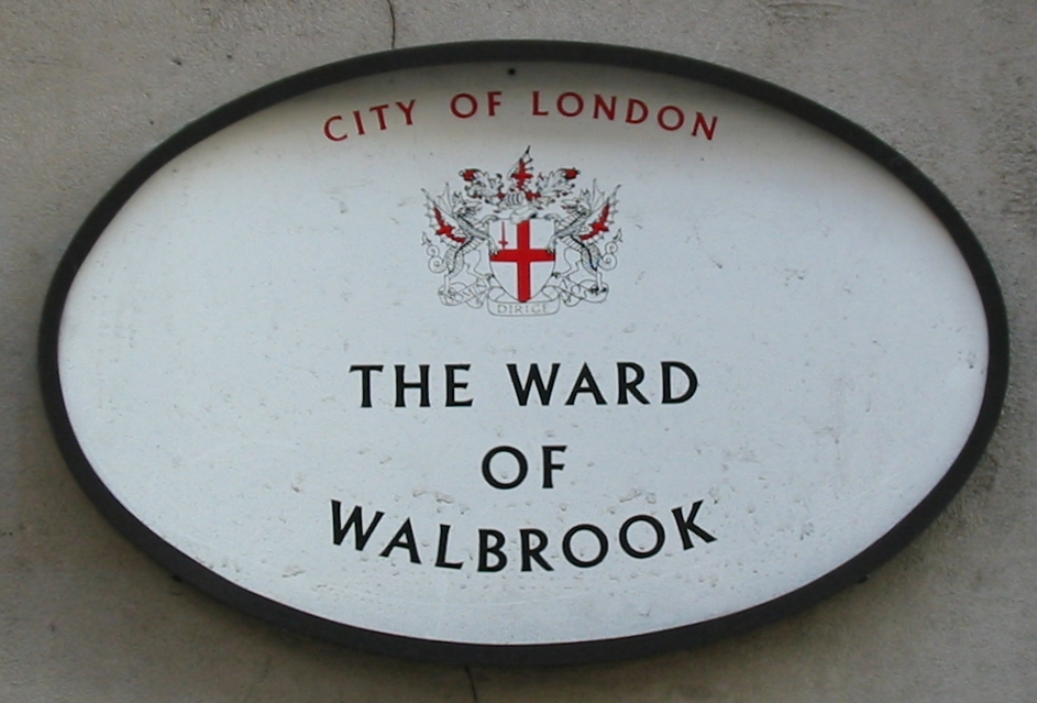 Nrf: Pliaque à Londres